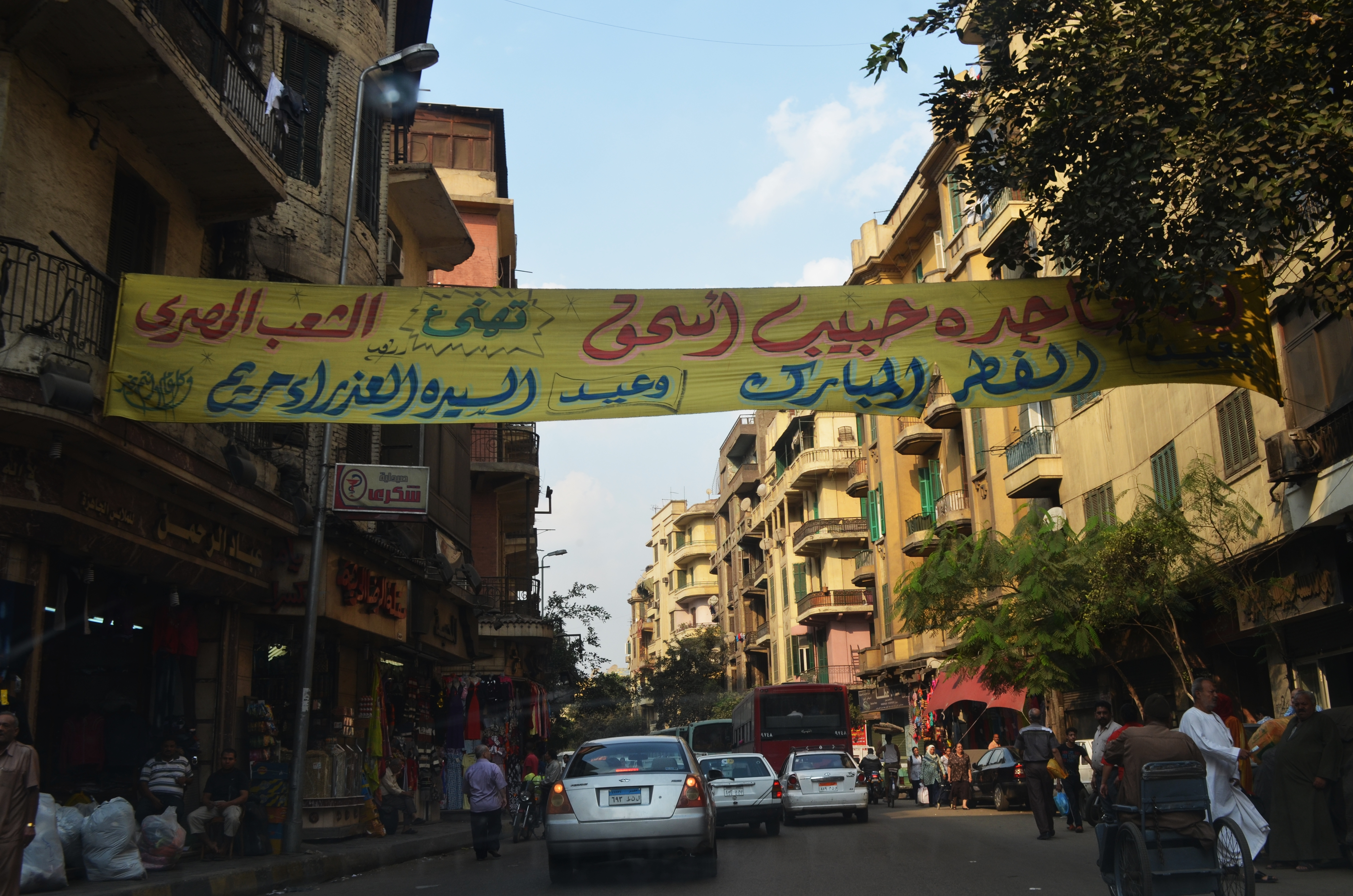 أحد لافتات التهنئة في شبرا، القاهرة